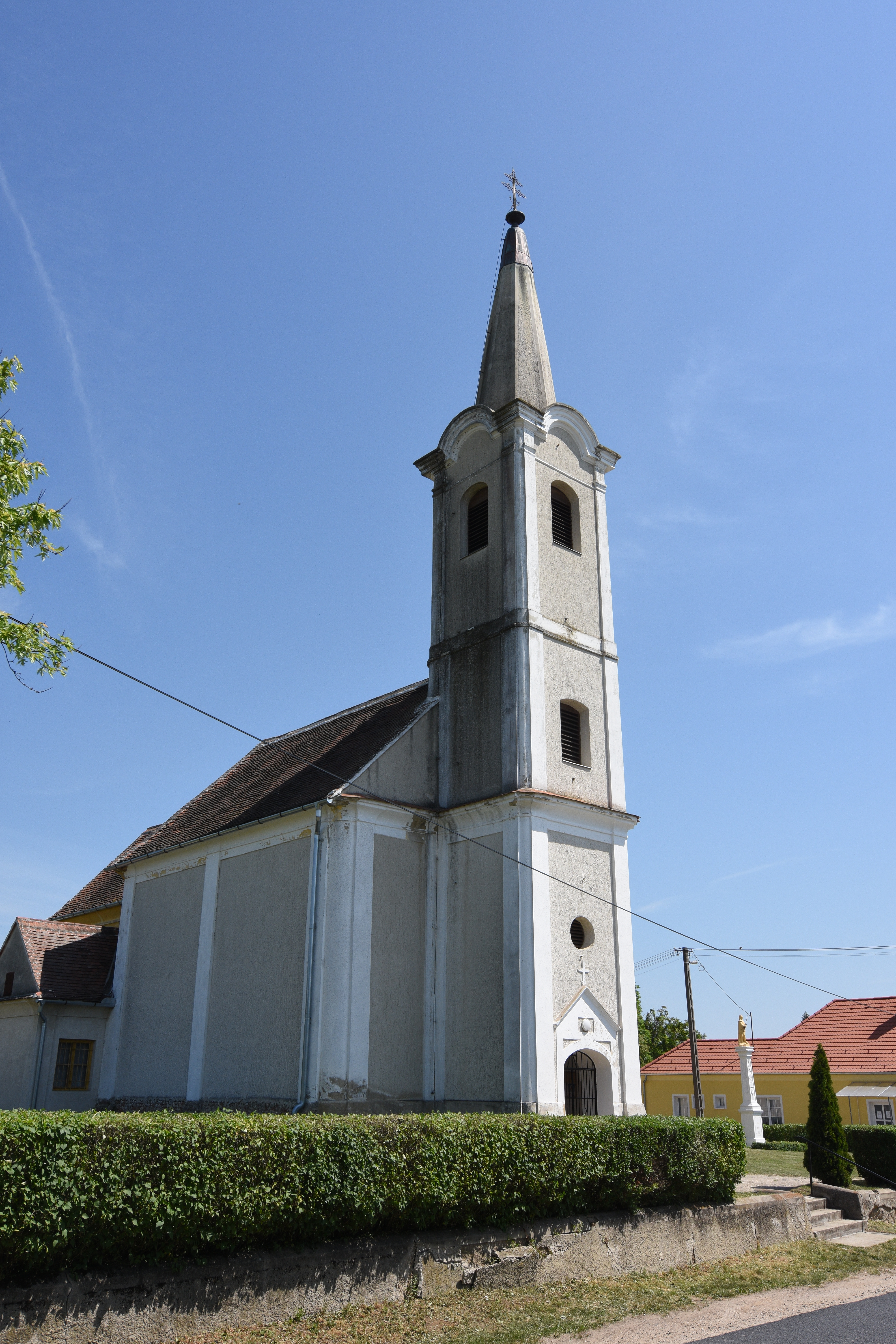 Szent Miklós templom Vasszilvágy